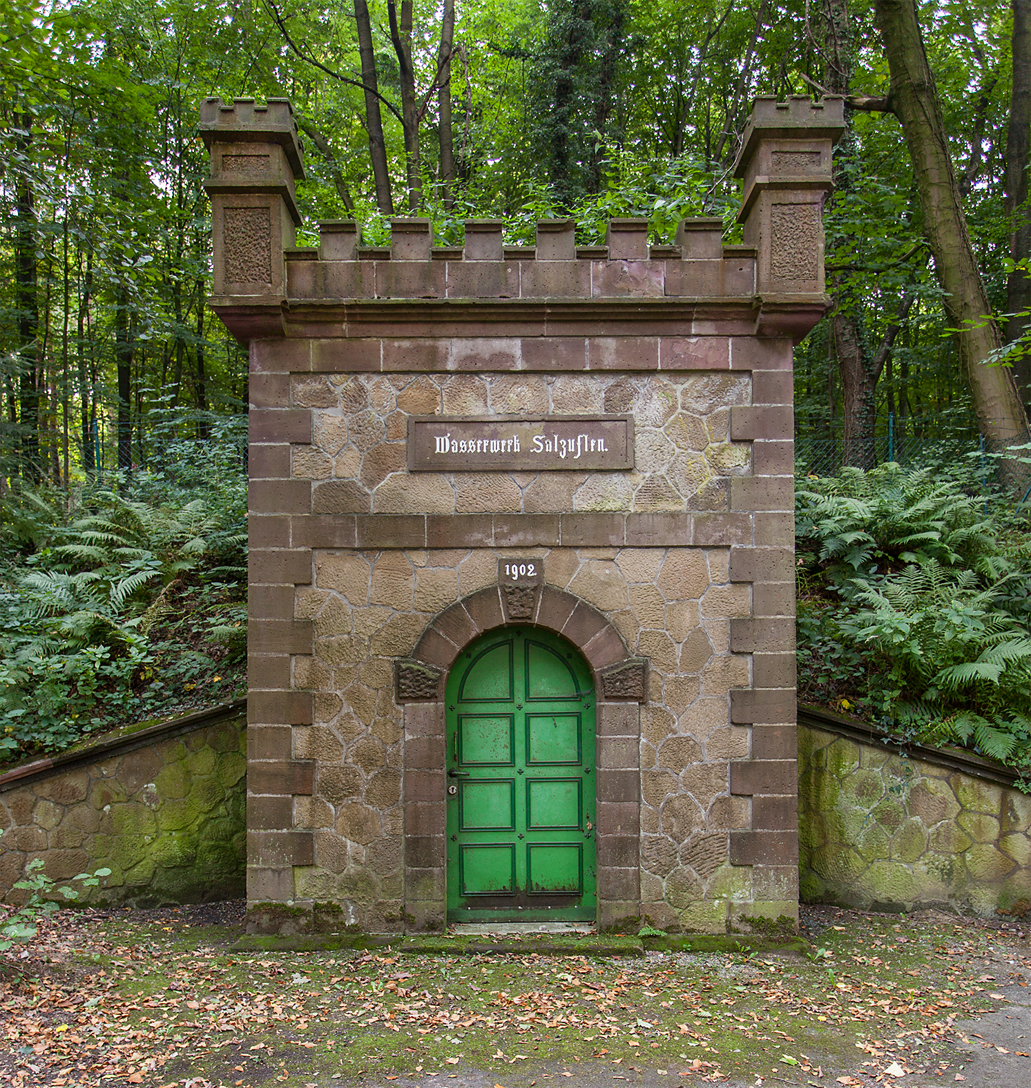 Wasserbehälter an der Salzufler Straße in Bad Salzuflen-Wüsten, Wasserwerk Bad Salzuflen This is a photograph of an architectural monument.